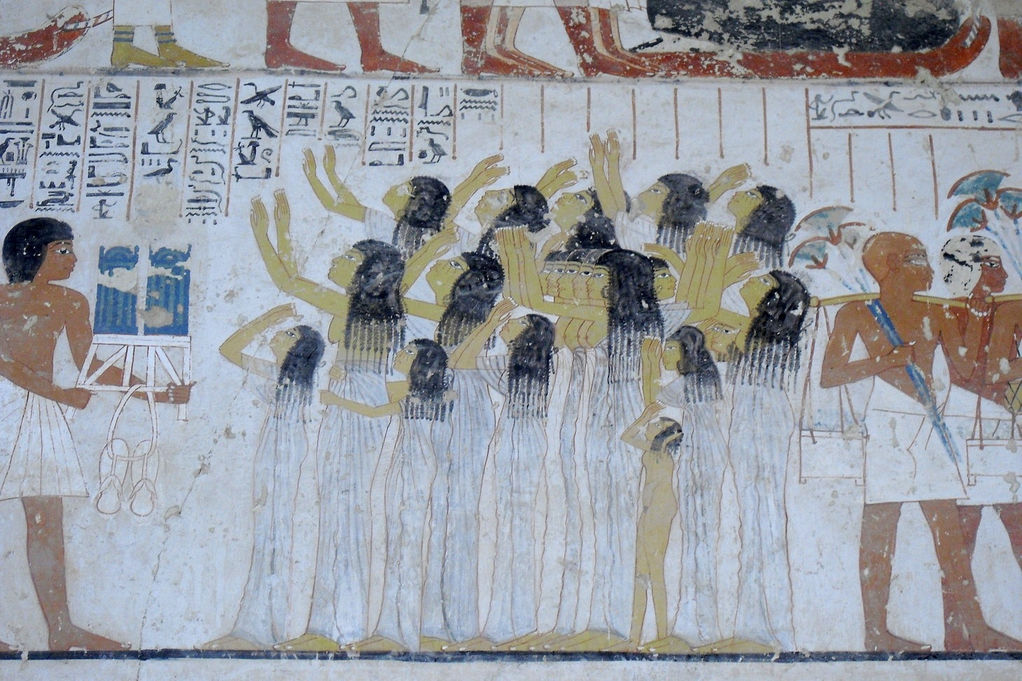 Grab des Ramose (TT55), Zeit des Amenophis III. und Echnaton, in Scheich Abd el-Gurna